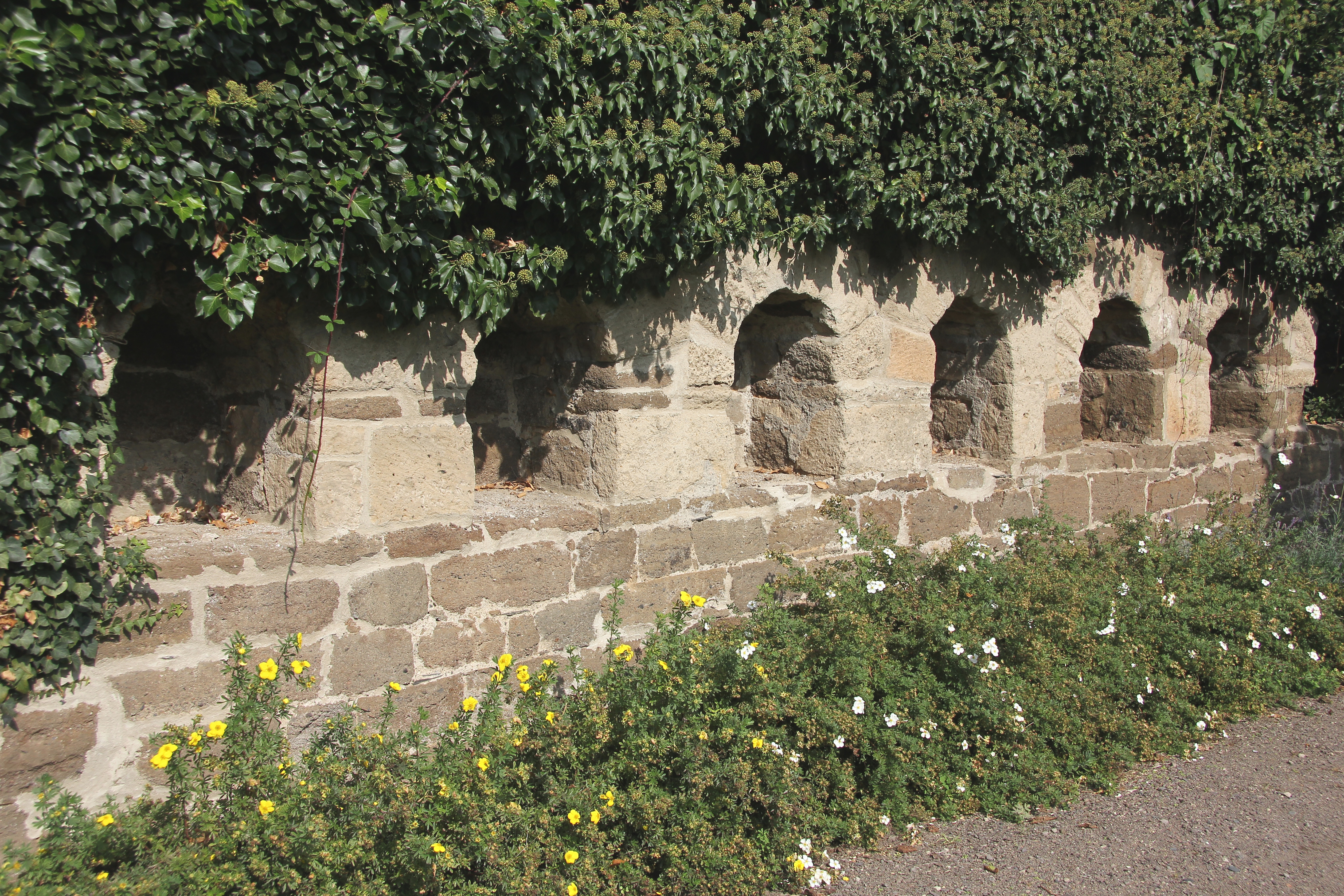 Teil der Einfriedigungsmauer des barocken Pfarrgartens vor der tiefer gelegenen Pfarrkirche St. Potentinus in Wehr (Eifel). Der Garten wurde vom Brauchtums- und Verschönerungsverein Wehr in der Zeit von 2002 bis 2005 neu gestaltet. In den Nischen standen früher die Bienenkörbe einer Imkerei.